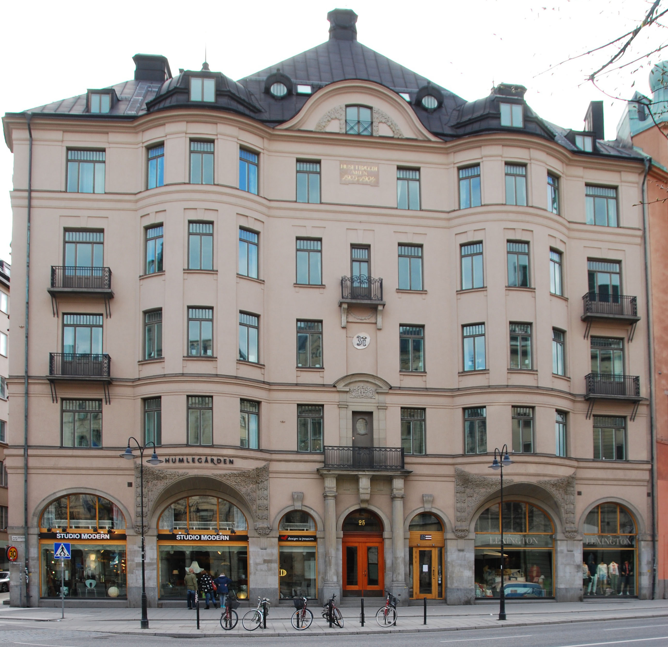 Birger Jarlsgatan 25, Stockholm. Byggt 1902-1904.